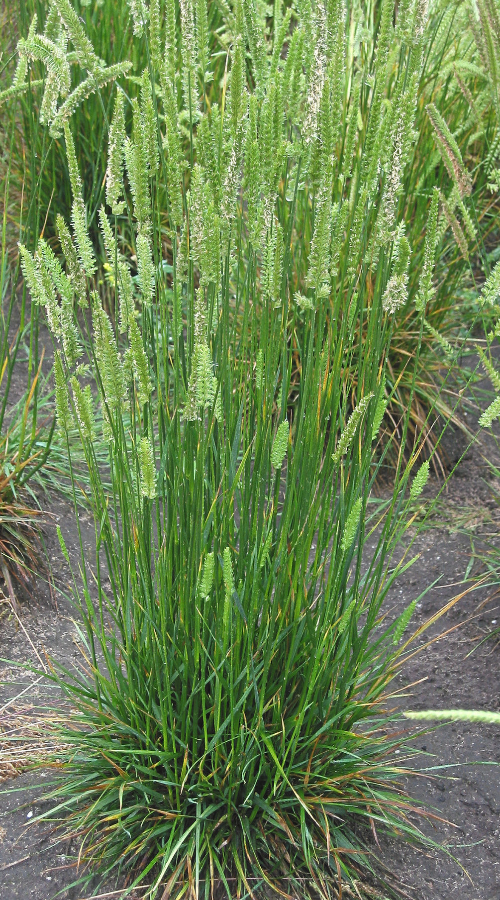 Cynosurus cristatus flowering (nl: kamgras bloeiend)